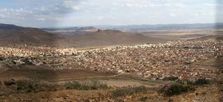 Vue de la ville de M'rirt, dans le moyen-atlas.